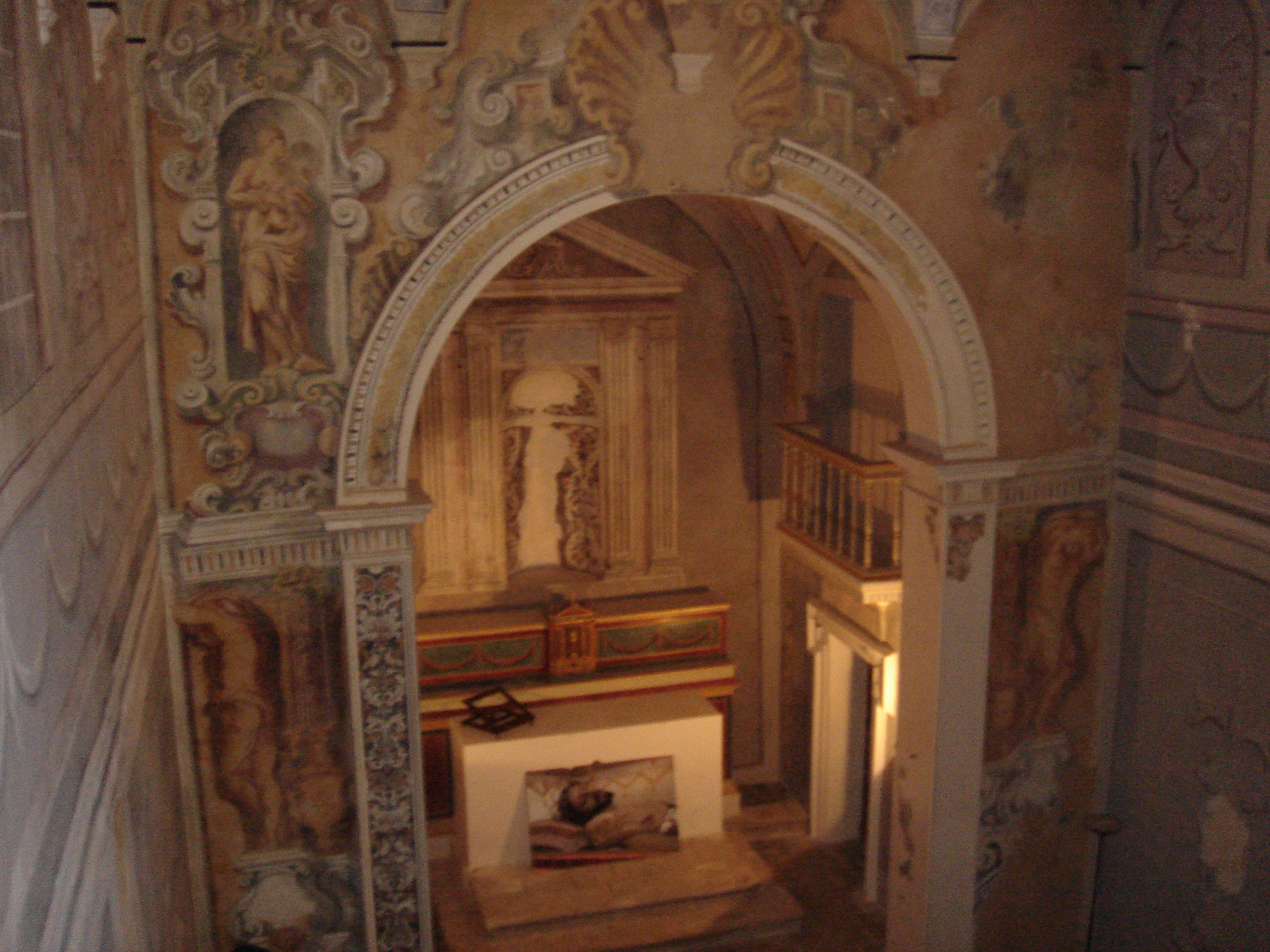 Cappella del Castello di Carini (Palermo)== Licenza d'uso ==